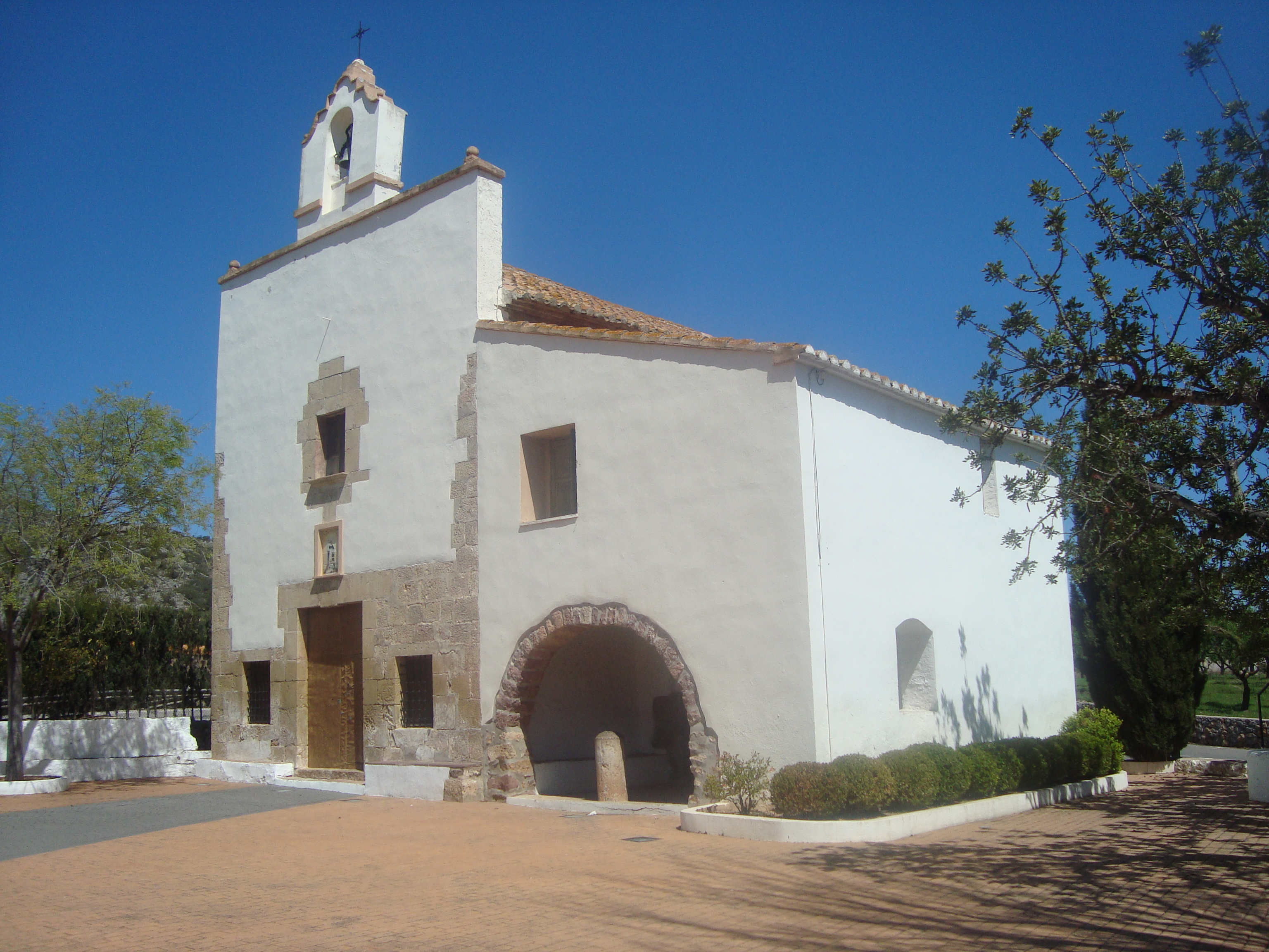 Ermita de Sant Vicent Ferrer (Borriol) 05.031-002.